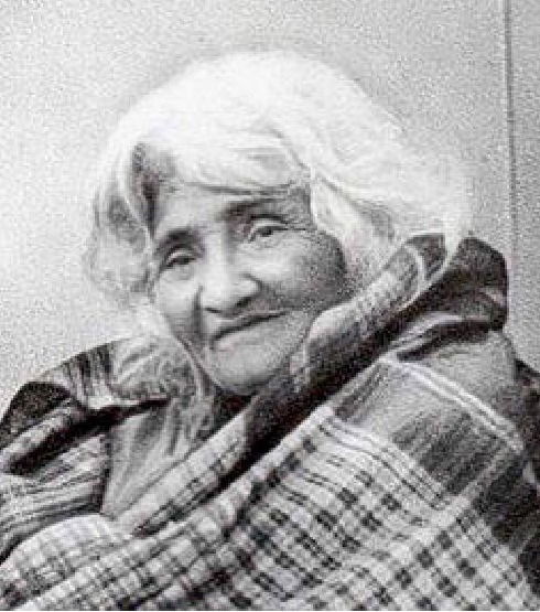 Hazrat Babajan, Pune, India